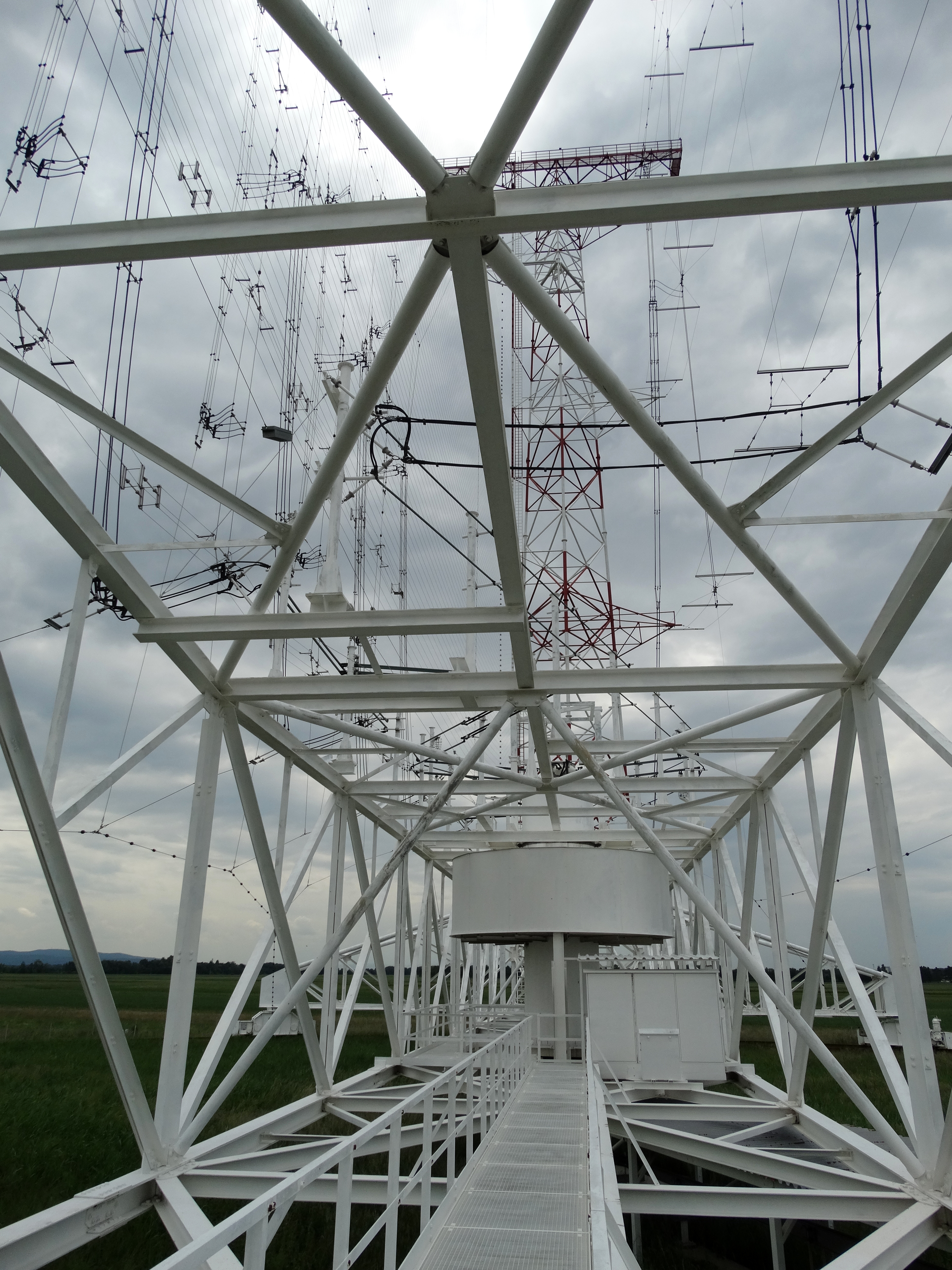 Im Inneren der großen Drehstandantenne für Kurzwelle am Sender Moosbrunn Erkennbar links oben das Reflektornetz und beidseitig davon je ein Antennenfeld für unterschiedliche Frequenzbereiche: Frequenzbereiche 1: 49m-, 41m-, 31m-Band Frequenzbereiche 2: 25m-, 19m-, 16m-, 13m-Band Leistung der Antenne: 500 kW